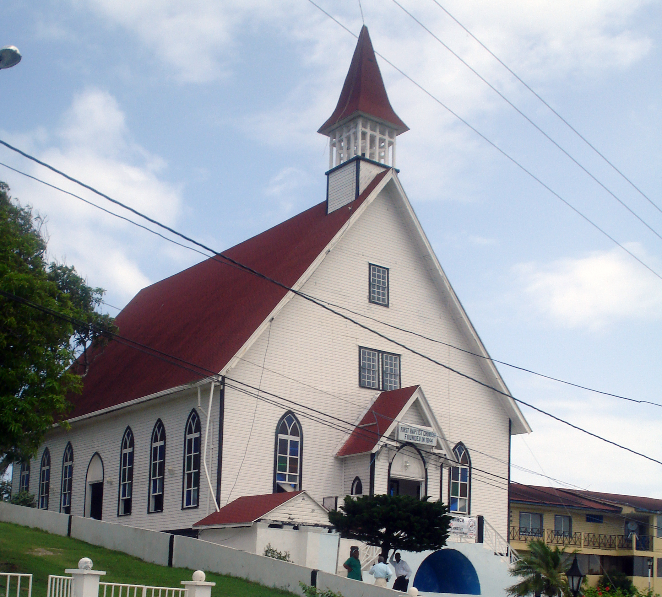 Ubicación: SAN ANDRES, SAN ANDRÉS Y PROVIDENCIA